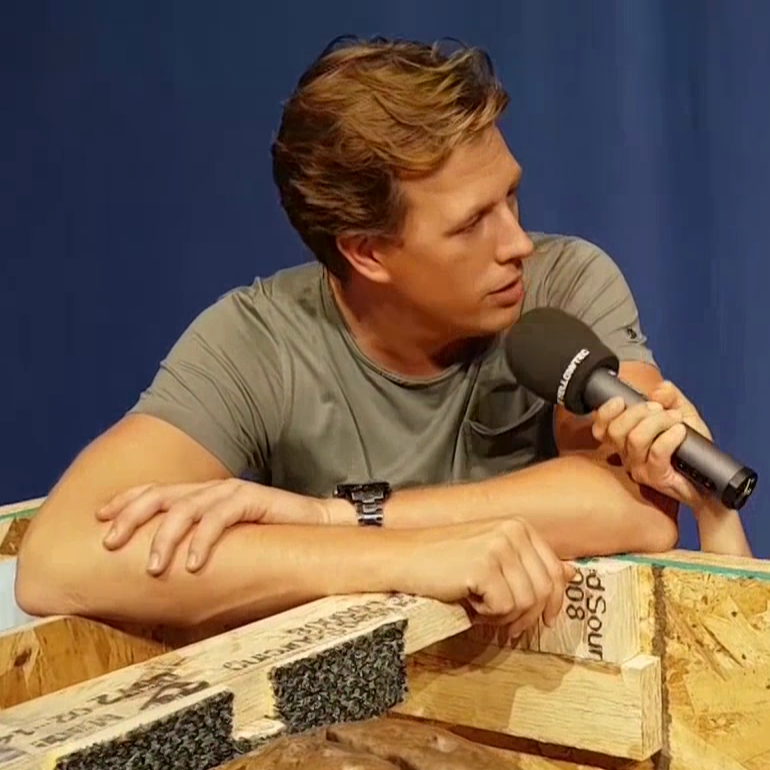 Freek Vonk in een interview met Sleutelstad in 2016.